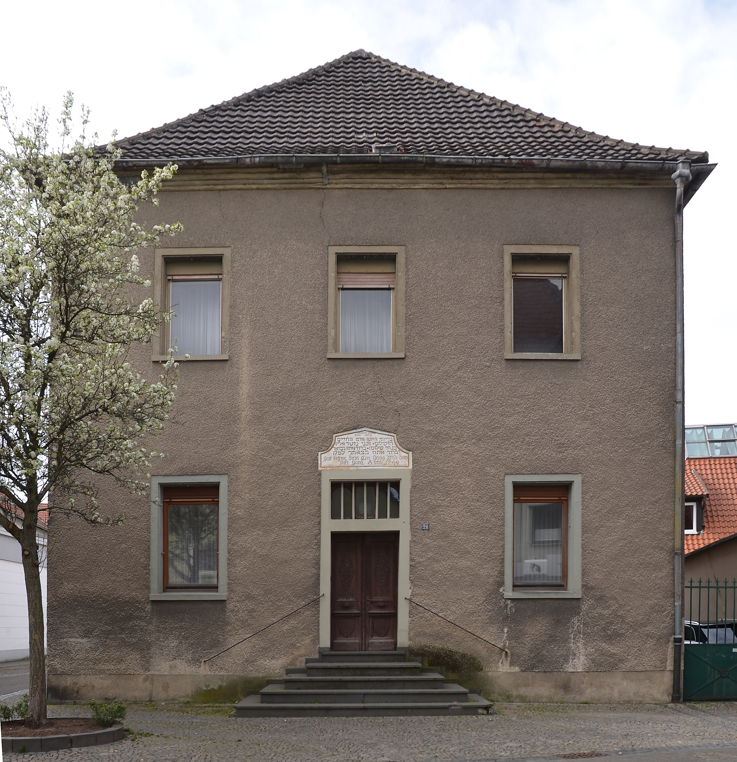 Werl, denkmalgeschütztes Haus, ehemliger jüdischer Betraum, Steinerstraße 28 This image shows a heritage building in Germany, located in the North Rhine-Westphalian city Werl (no. A 162).